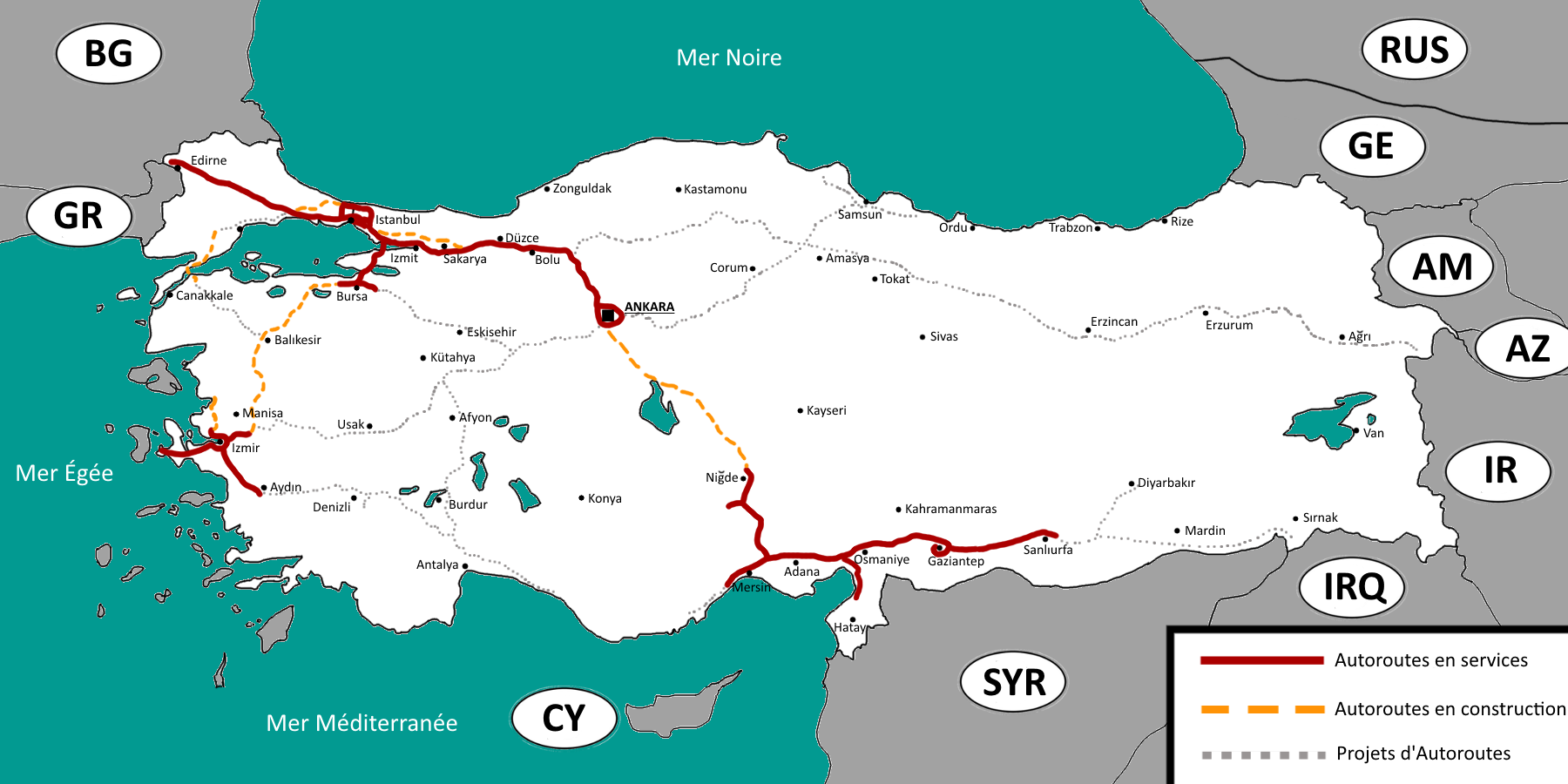 Cartes des autoroutes de Turquie